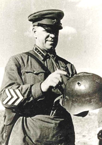 Георгий Константинович Жуков (1896 — 1974). Халхин-Гол. 1939 г.